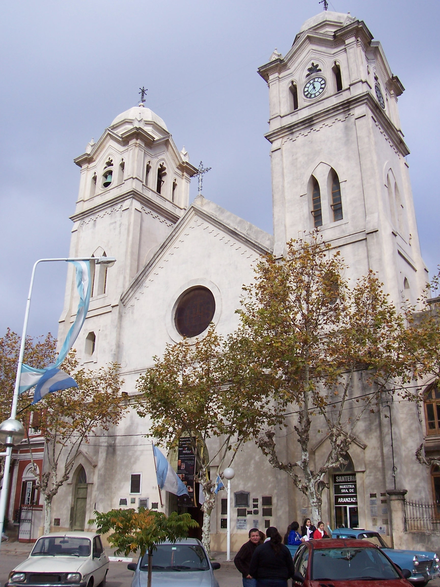 Casco histórico arquitectónico de la ciudad de Victoria